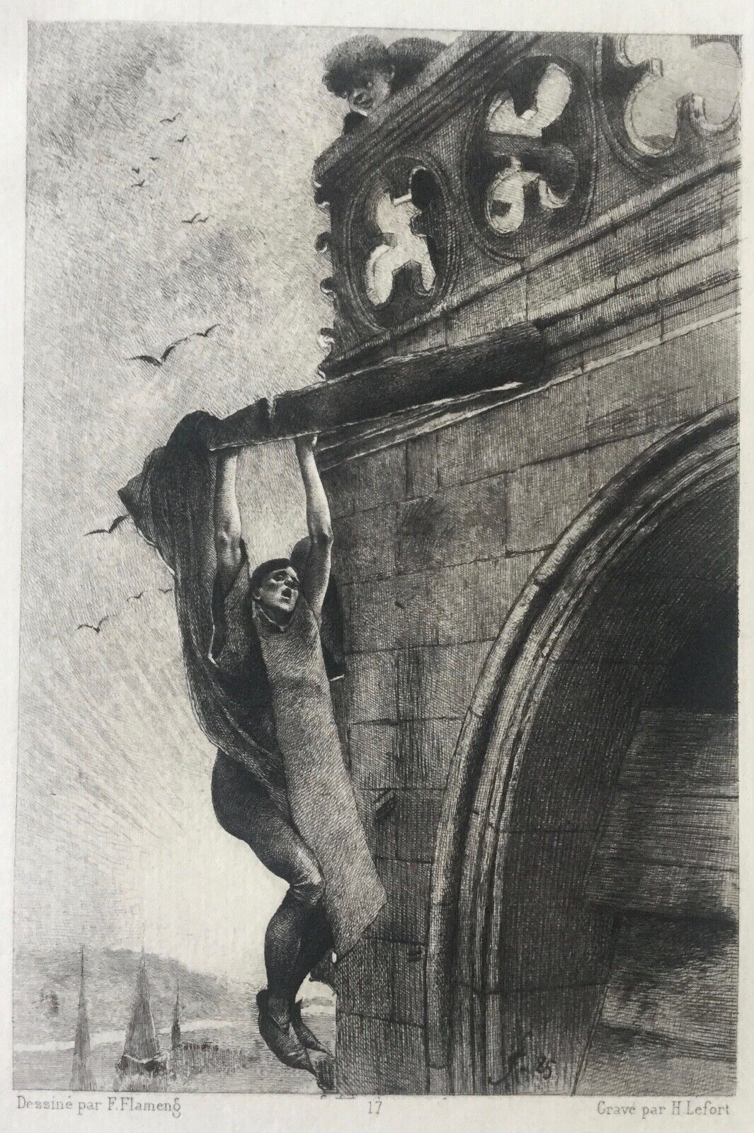 Claude Frollo suspendu à une gouttière au sommet de la cathédrale Notre-Dame tandis que Quasimodo observe la pendaison de la Esmeralda. Gravure d'Henri Émile Lefort d'après un dessin de François Flameng, Eau-forte illustrant Notre-Dame de Paris de Victor Hugo.